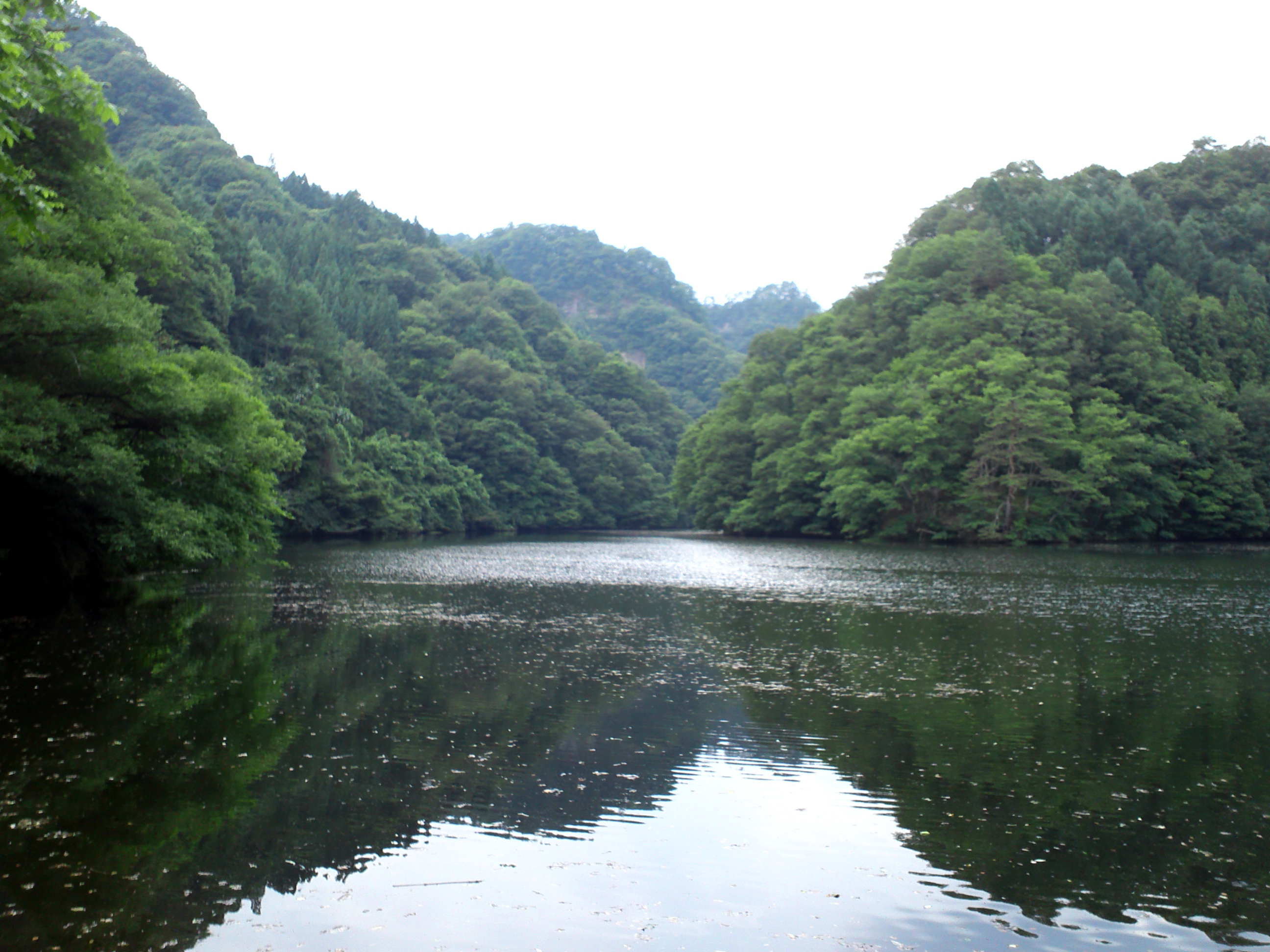 1847年善光寺地震による河道閉塞で生じた柳久保池。所在地、長野市信州新町